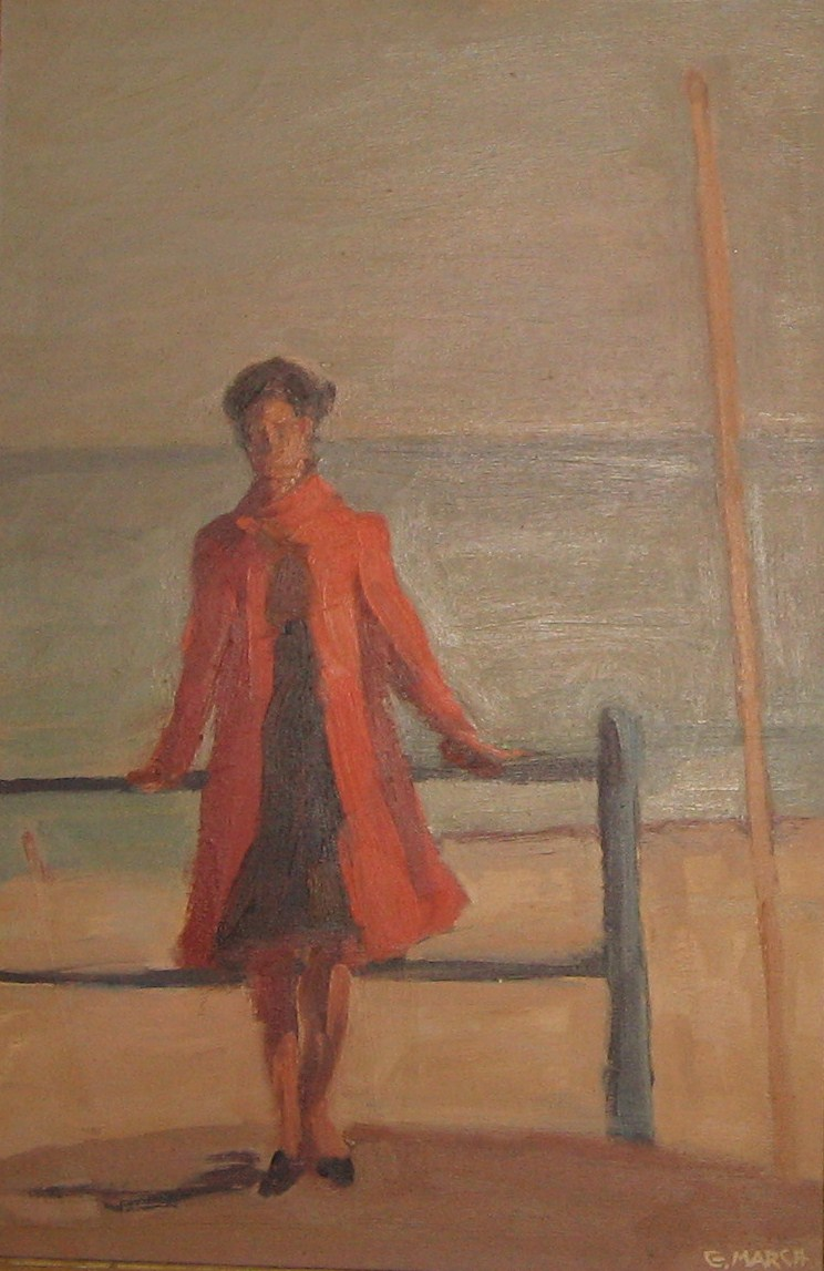 Giovanni March, Ritratto di signora